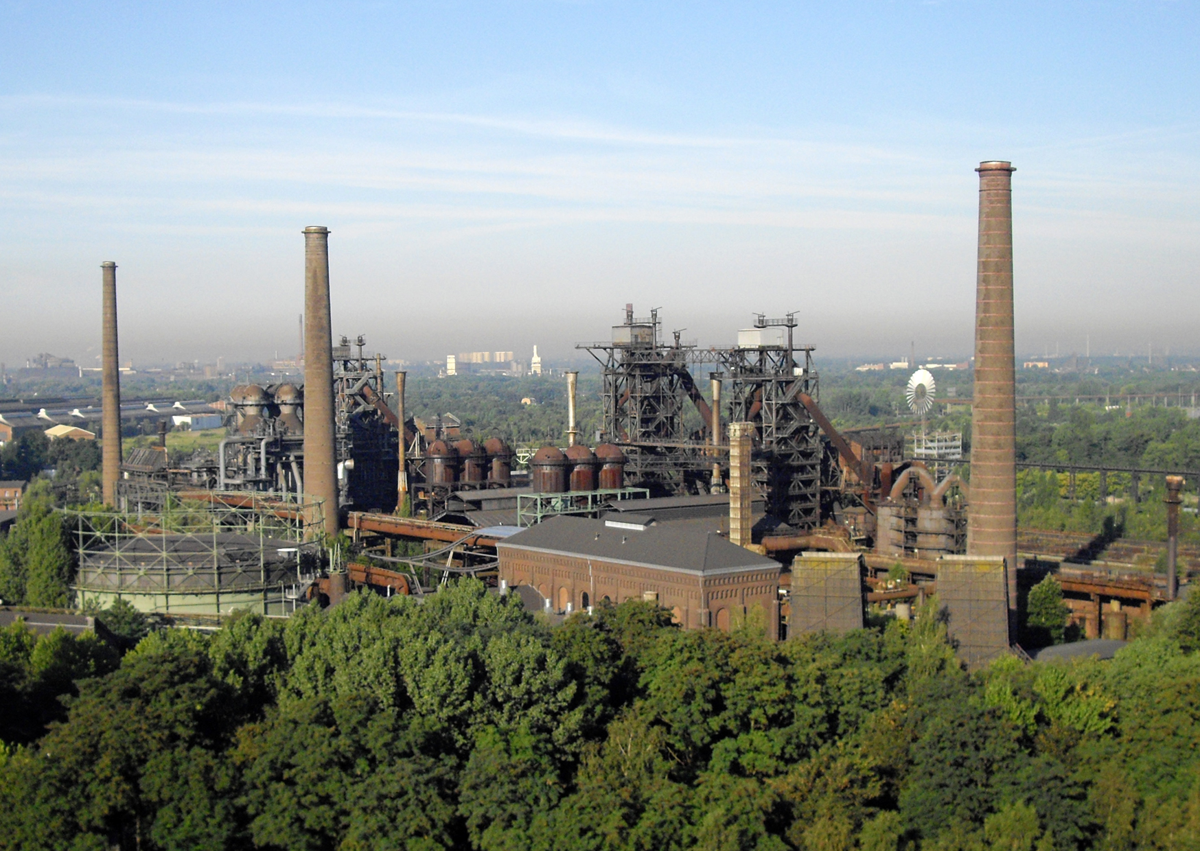 Luftaufnahme Laundschaftspark Duisburg Nord